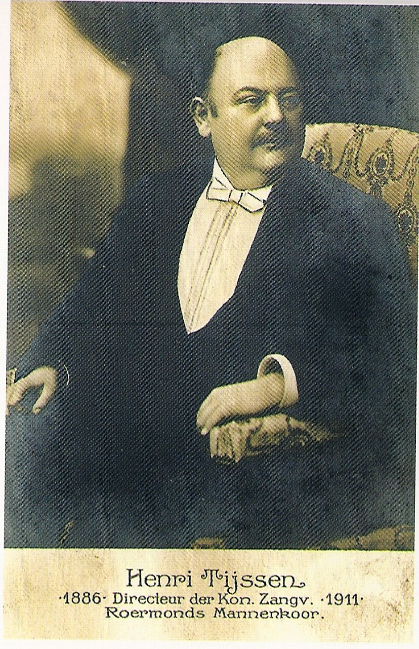 Nederlands componist en dirigent